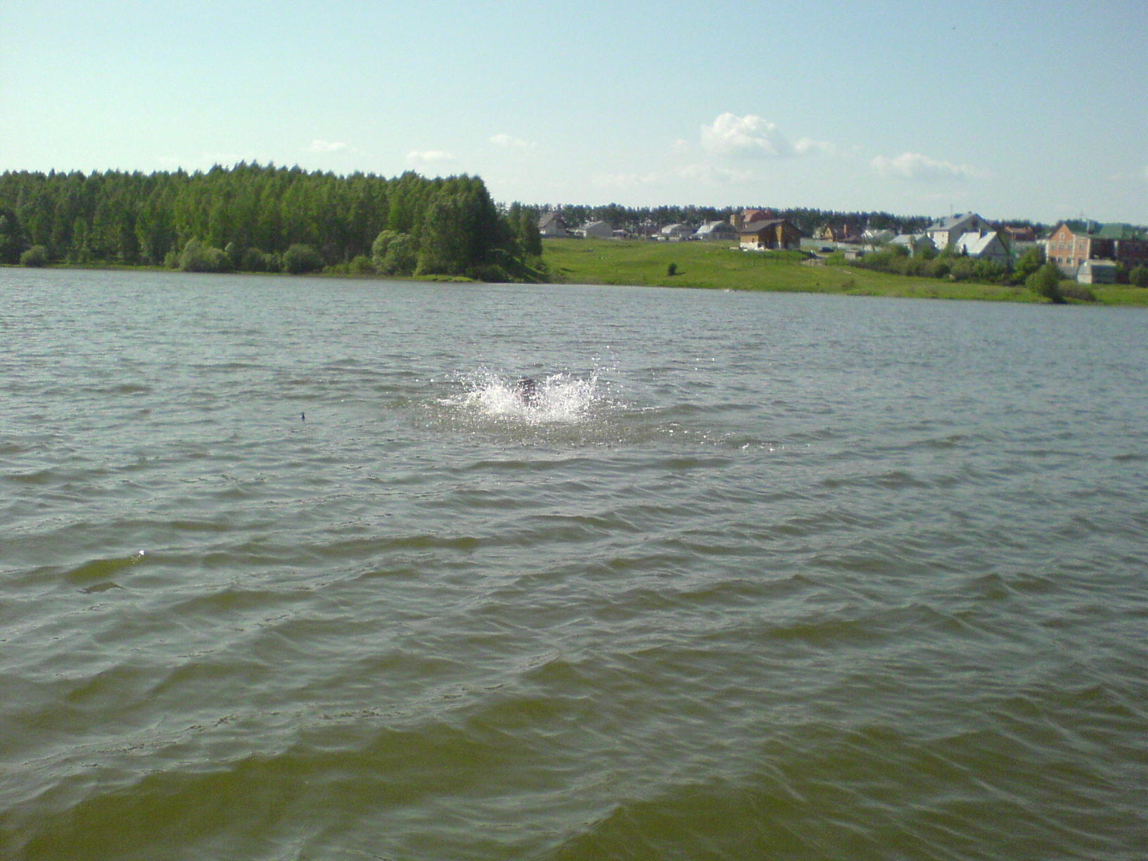 Озеро